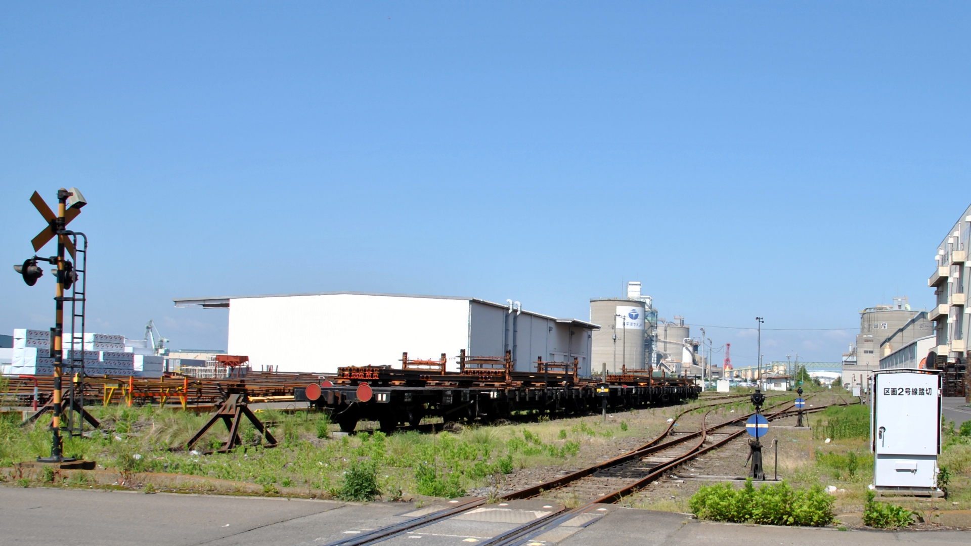 仙台埠頭駅（構内）